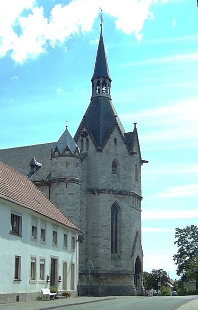 Obermarsberg Nikolaikirche, Germany.